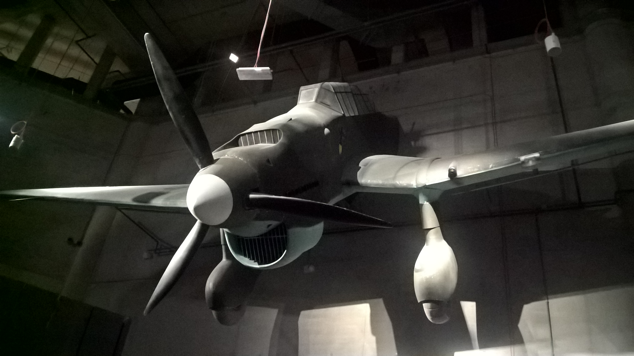 Makieta bombowca nurkującego Junkers Ju 87 Stuka w Muzeum II Wojny Światowej w Gdańsku.